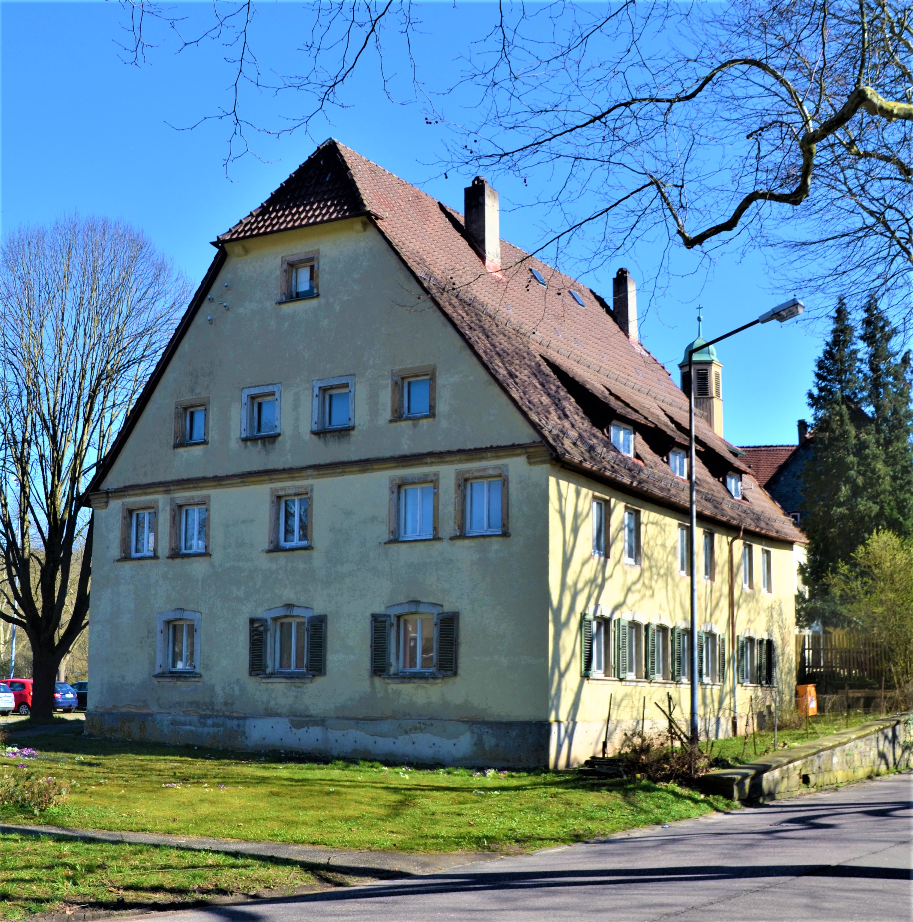 Hofmeisterei von St. Katharina in Schwäbisch Gmünd